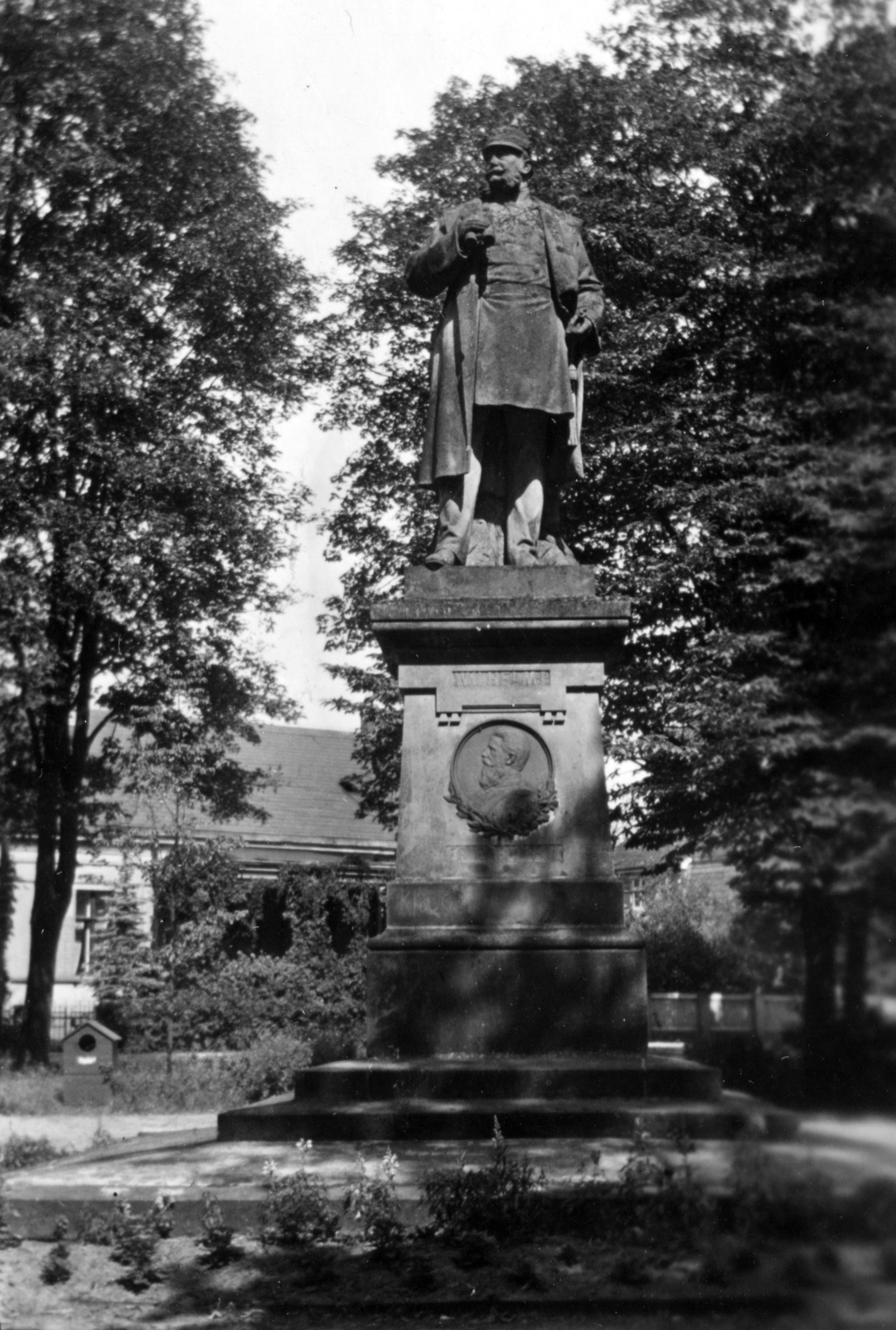 Denkmal für Kaiser Wilhelm I. in Friedeberg/Nm auf einer Fotografie aus dem Jahre 1940